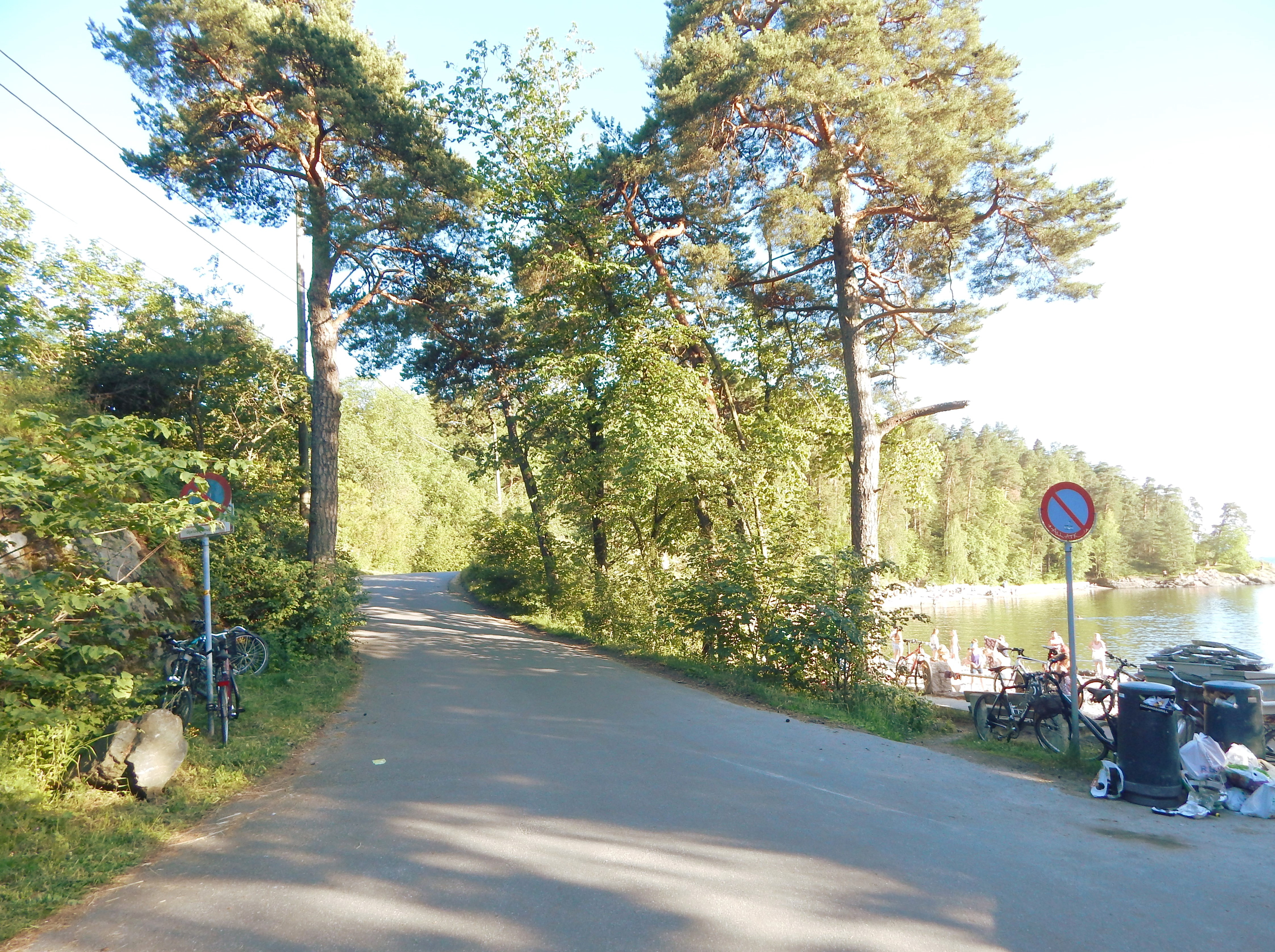 Holsts vei ved Bygdøy sjøbad